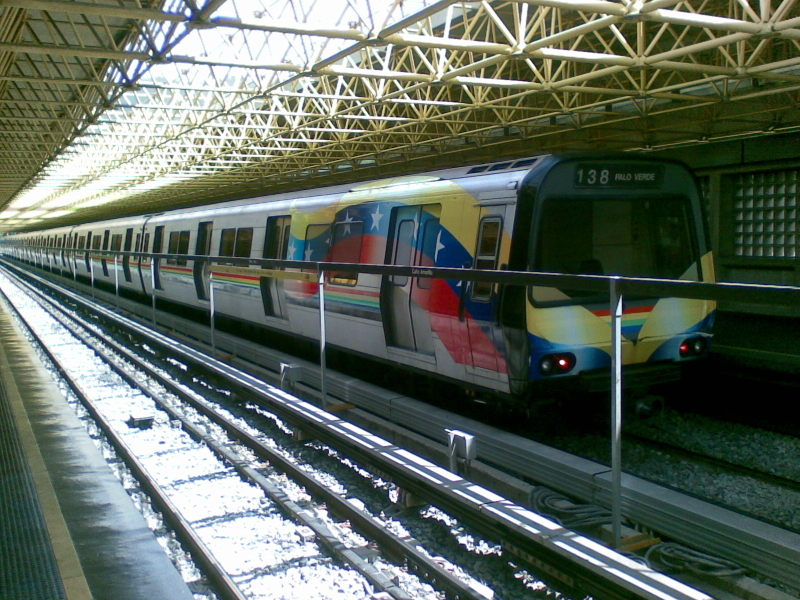 Tren del Metro de Caracas, Estación Caño Amarillo